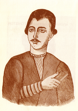 Emmanuel Xanthos, Founder of /Fondateur de la Filikí Etería